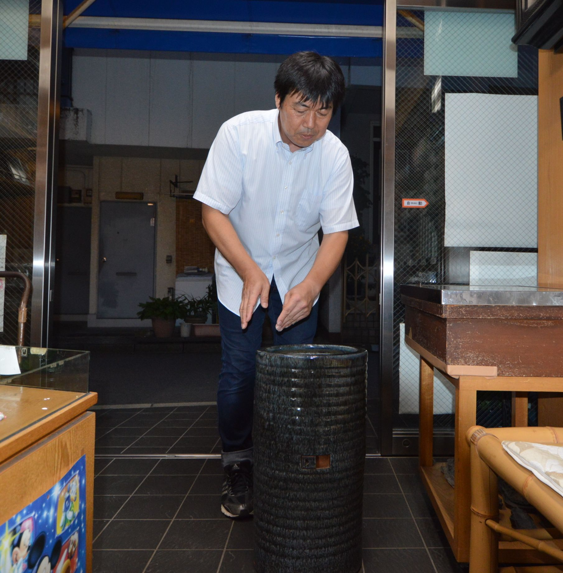 手焼き用立ち火鉢・(株)守半本店所有